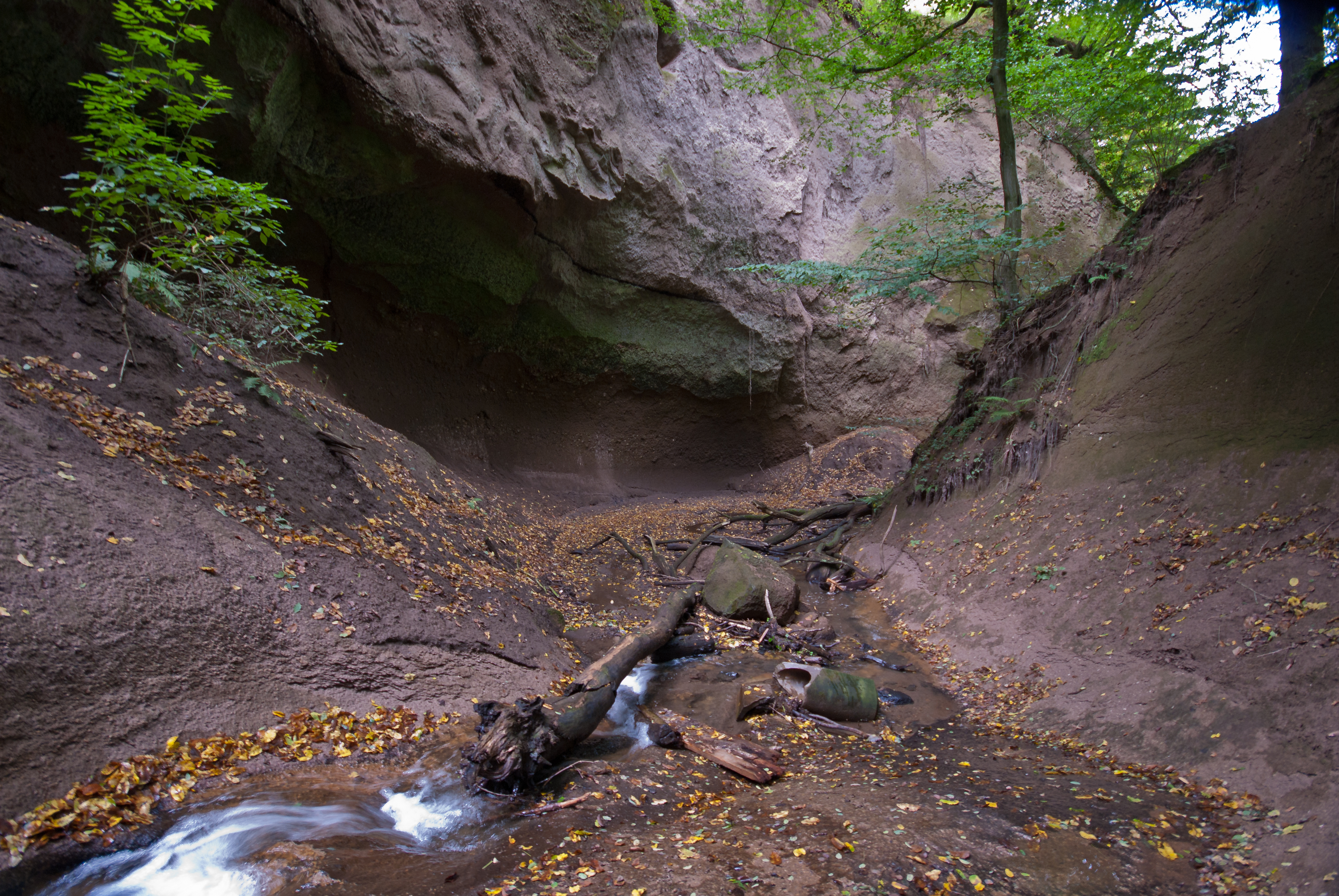 Die Wolfsschlucht des Tönissteiner Baches zwischen Bad Tönisstein und Wassenach